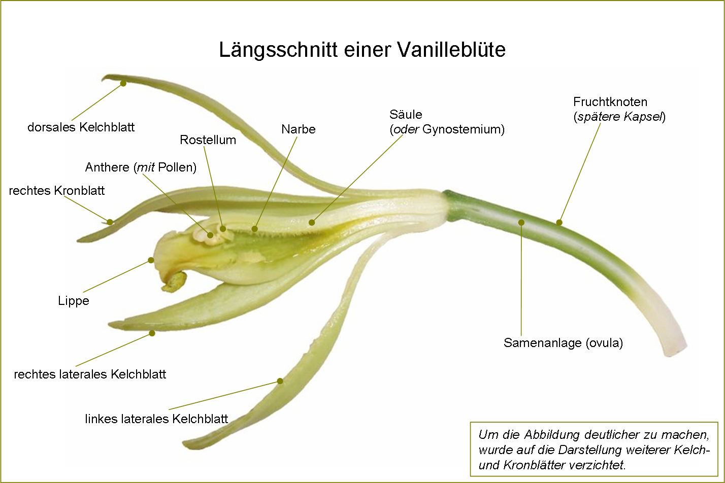 Photo & caption : B.navez - JAN 2006